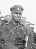 Süddeutschland, Manöver der 5. und 7. Division Gruppenmanöver der 5. und 7. Division in Bayern, Württemberg und Baden 1926. Zweiter von rechts der damalige Hauptmann Alfred Jodl, später als General im Führerhauptquartier. Links neben ihm (mit Zigarette) sein Bruder Ferdinand Jodl. Beide waren Offiz Abgebildete Personen: Jodl, Alfred: Generaloberst, Ritterkreuz (RK), Heer, Nürnberger Prozeß, hingerichtet 1946, Deutschland (PND 118557602) Jodl, Ferdinand: Generalleutnant, Ritterkreuz (RK), Heer, Deutschland